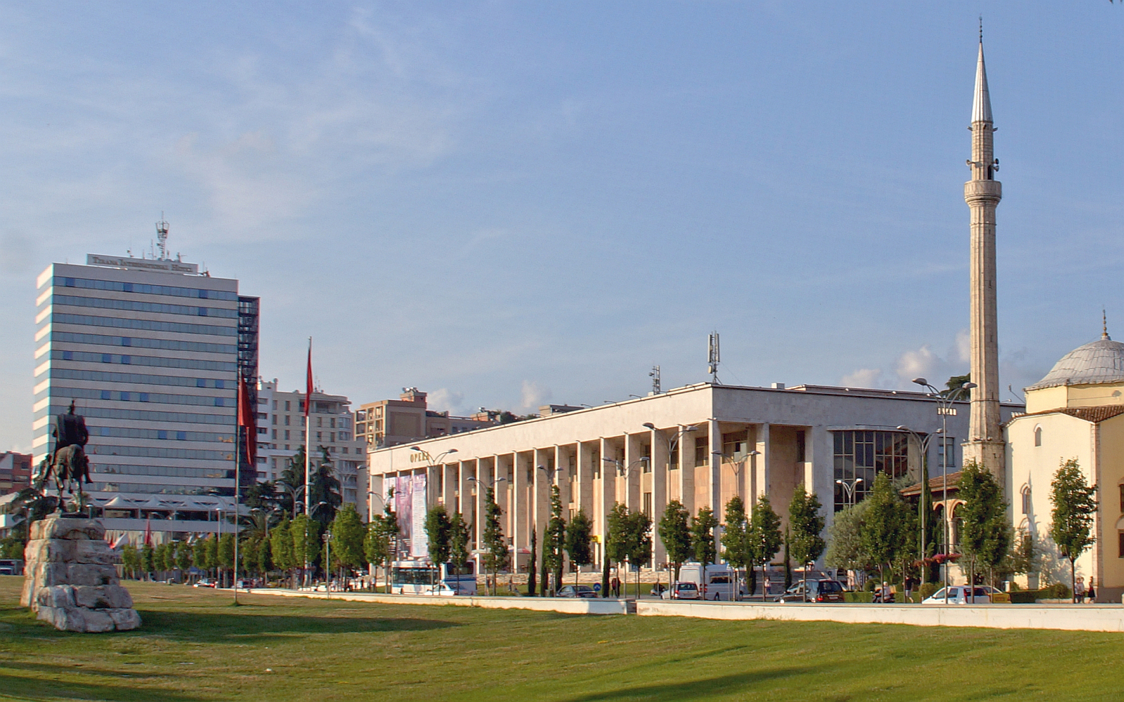 Skanderbeg-Platz - mittig Kulturzentrum mit Oper und Nationalbibliothek. links Reiterstandbild Fürst Skanderbeg, rechts Et’hem-Bey-Moschee, Tirana, Albanien - Foto 2014 Wolfgang Pehlemann DSC05905